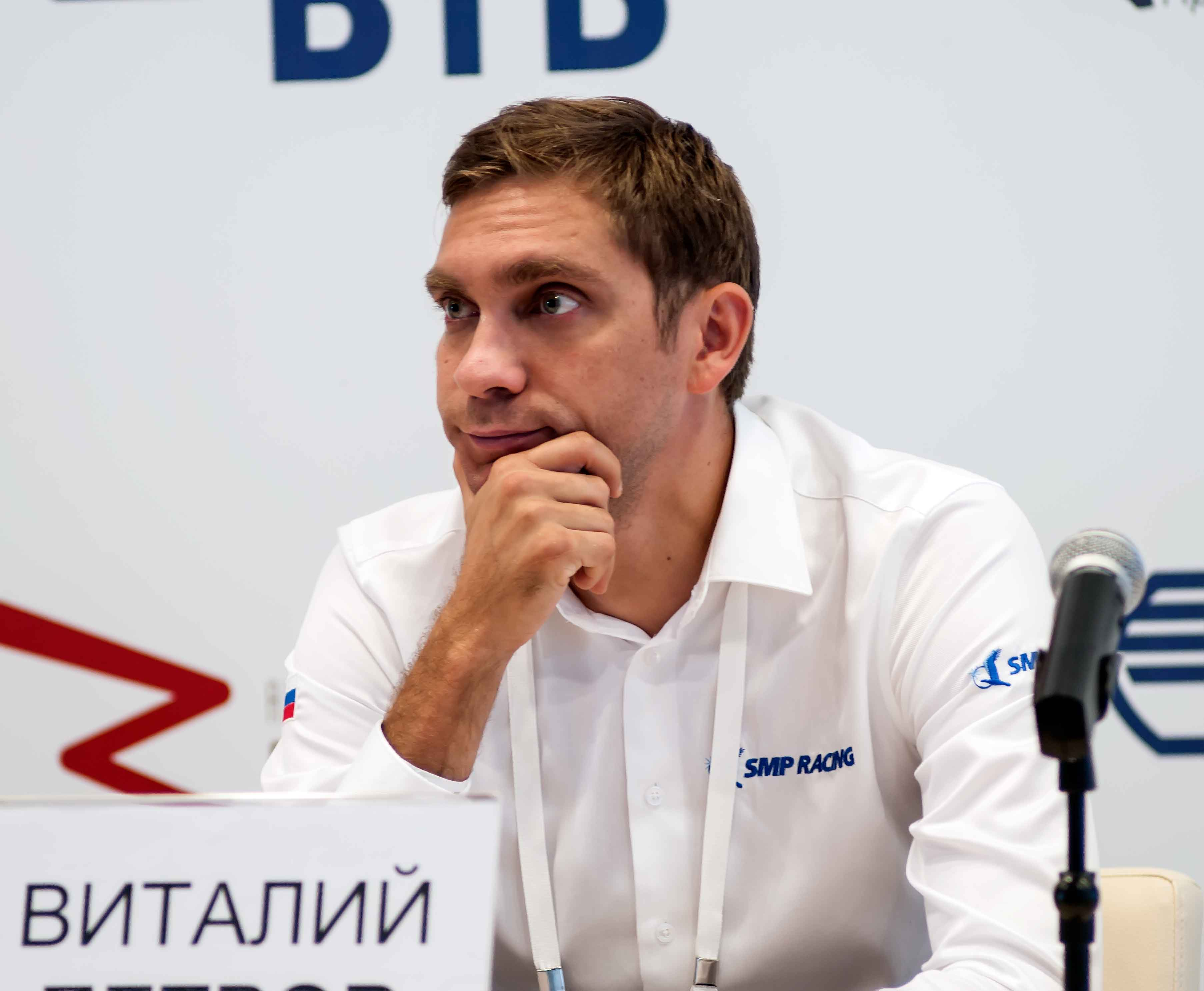 пресс-конференция